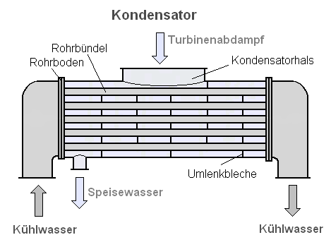 Kondensator